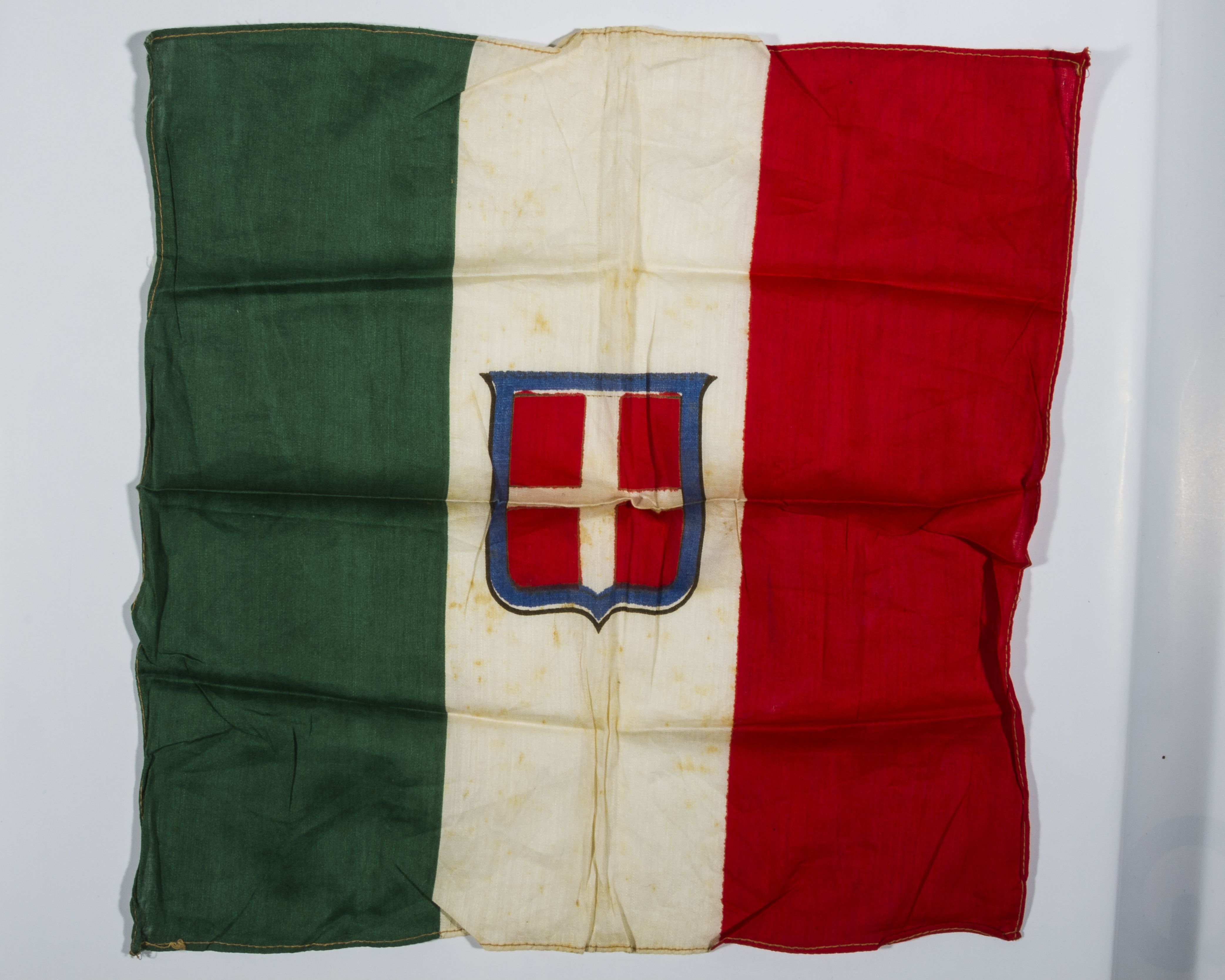 I document sono stati forniti dalla Sig.ra Francesca Petrassi. Non si dispone della storia dei contributi